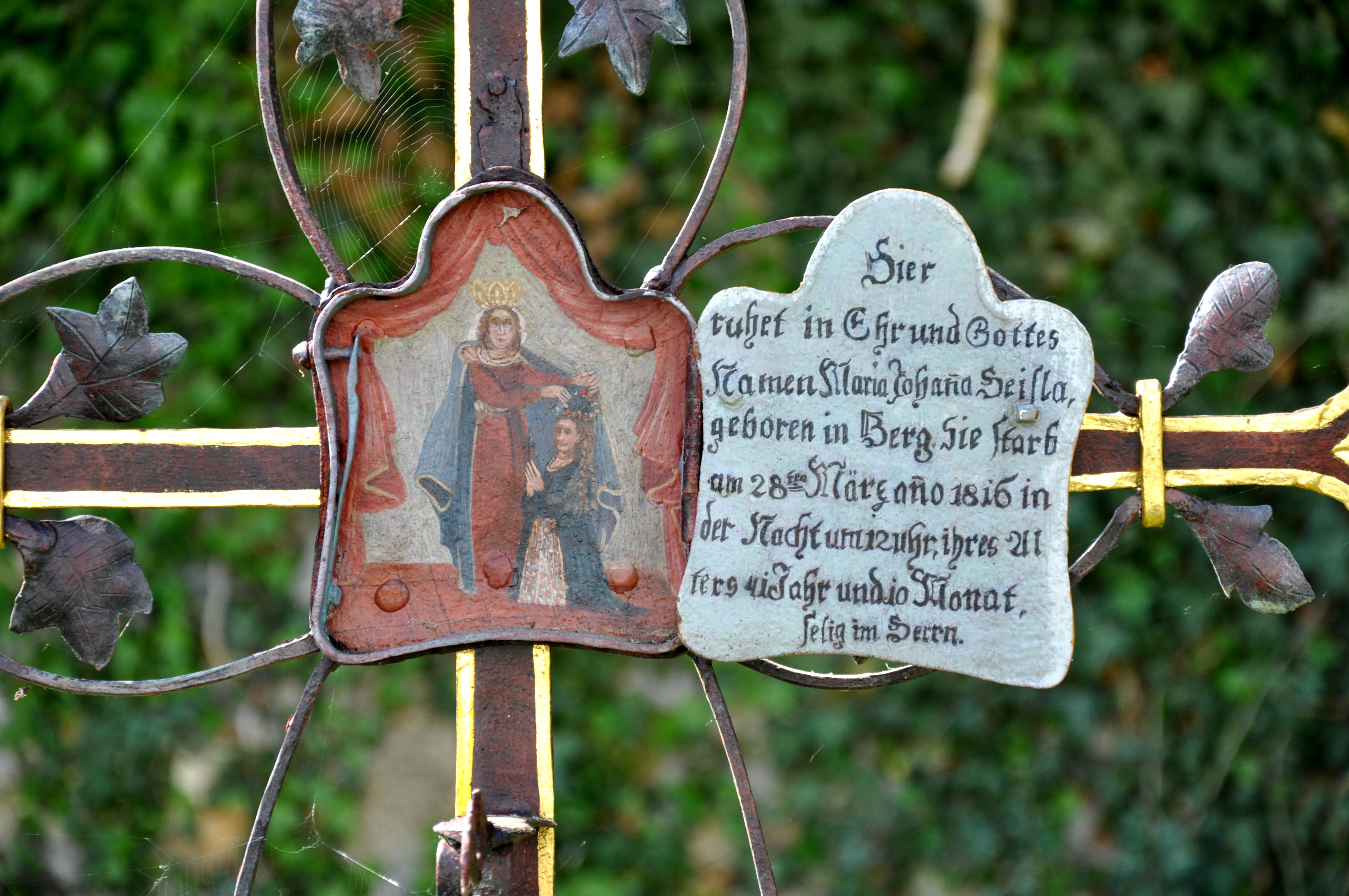 88276 Berg (Schussental), Alter Friedhof, Grabkreuz, Detail